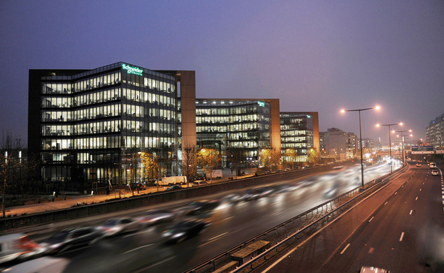 Штаб-квартира Schneider Electric